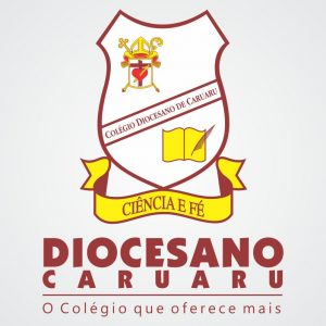 Brasão Colégio Diocesano de Caruaru